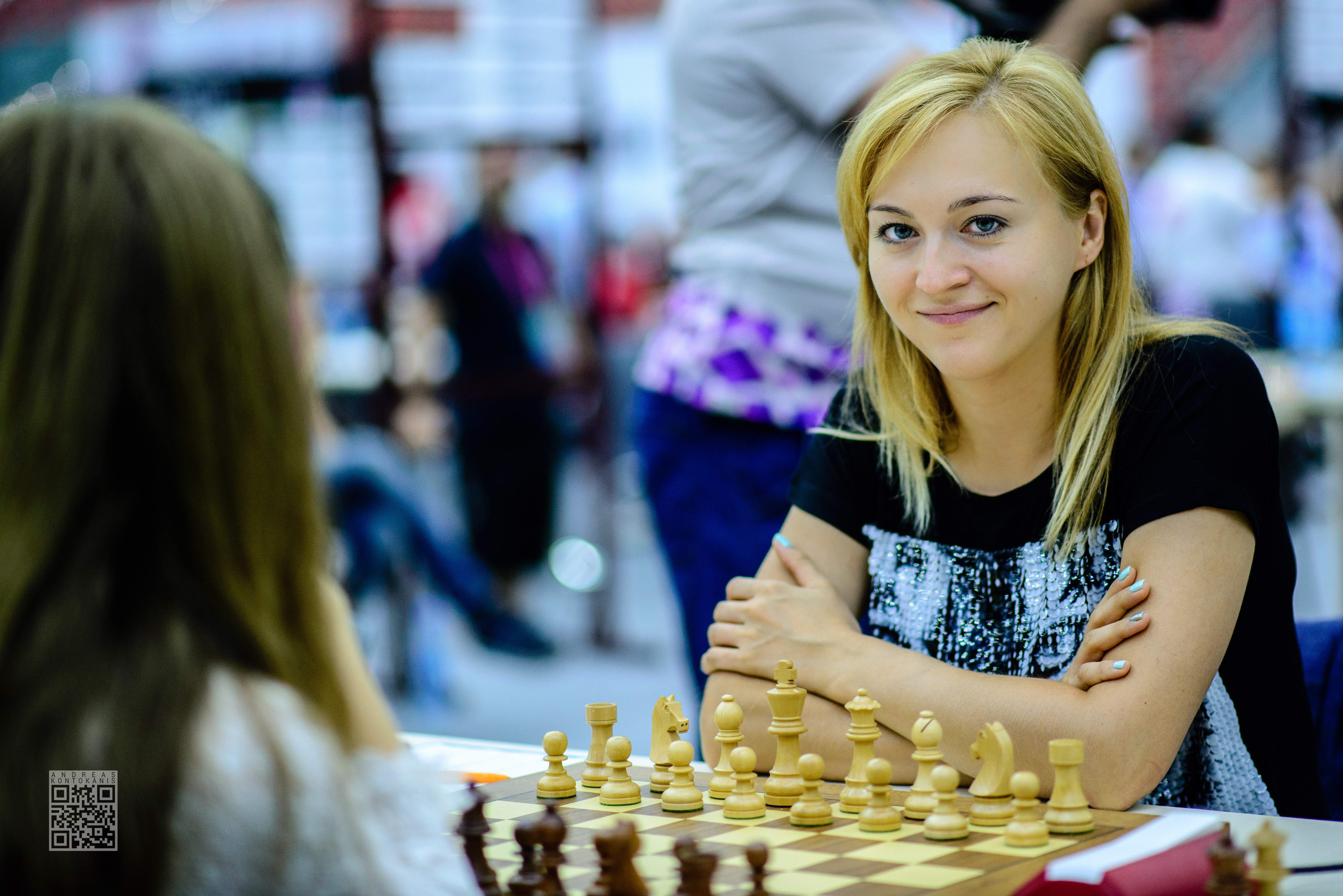 Ushenina Anna